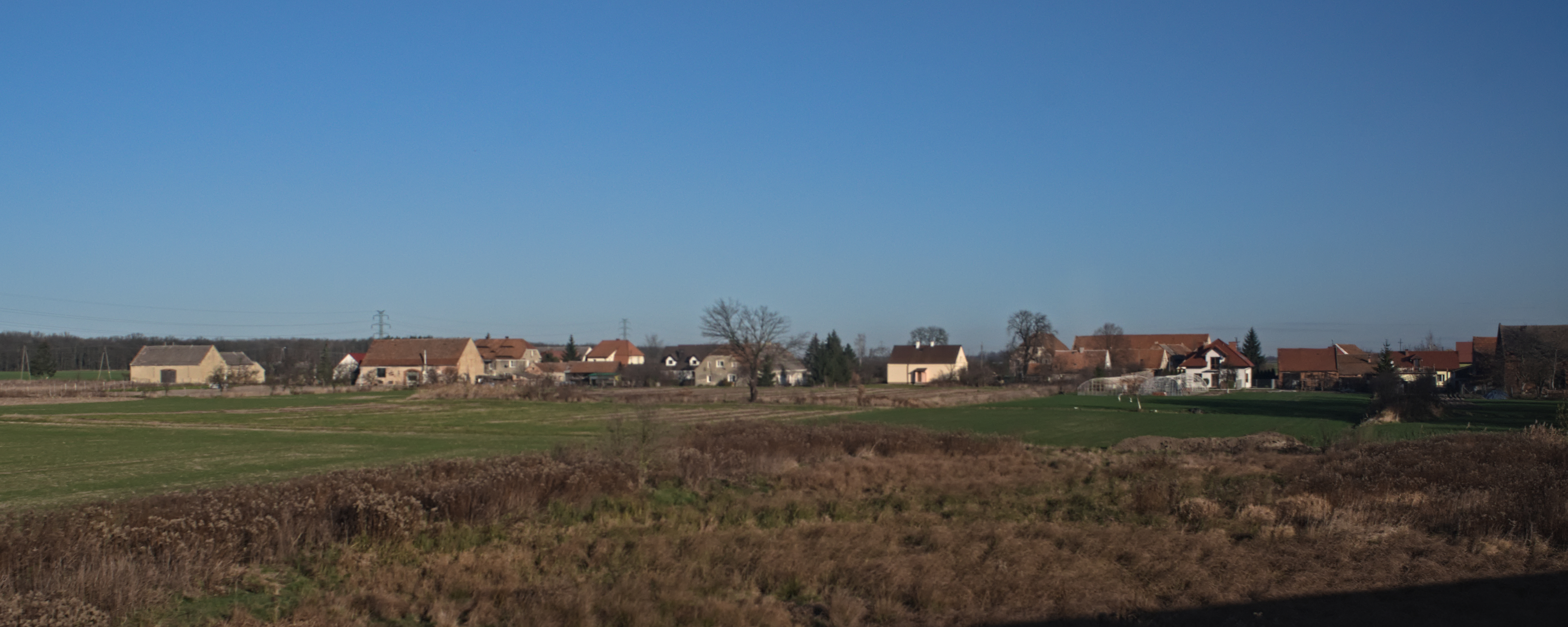 wieś Wszemiłowice, widok od południa, widok z okna pociągu do Wrocławia